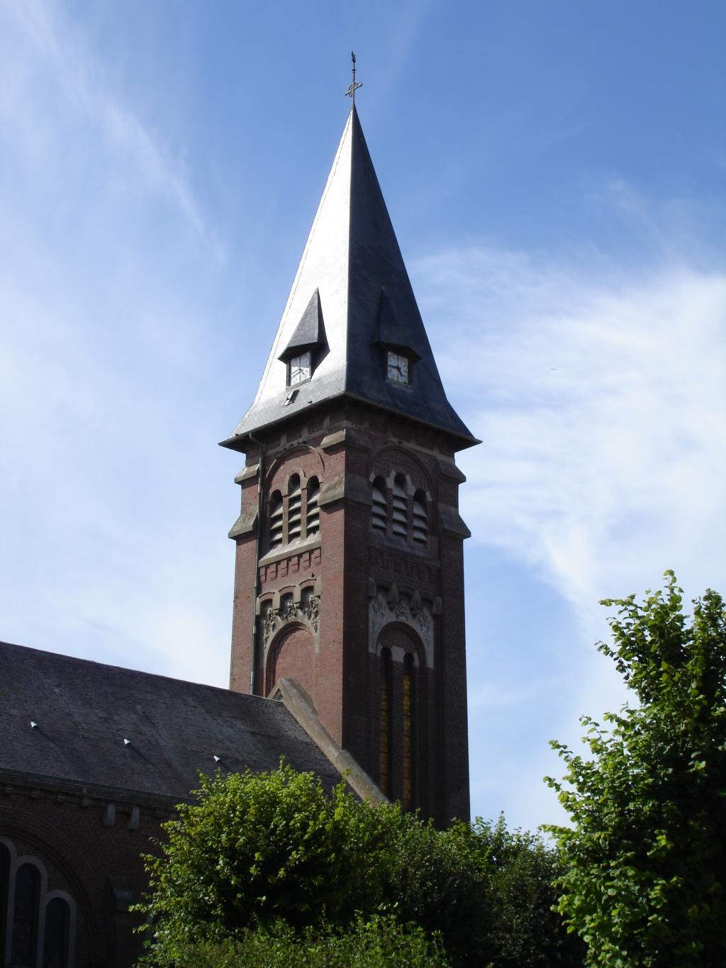 Clocher de l'église - Le Hamel, Somme (France)